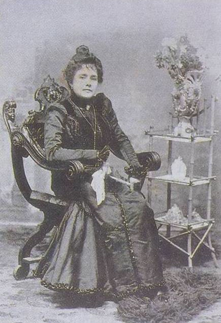 Portrait of Zoila Rosa Martínez.